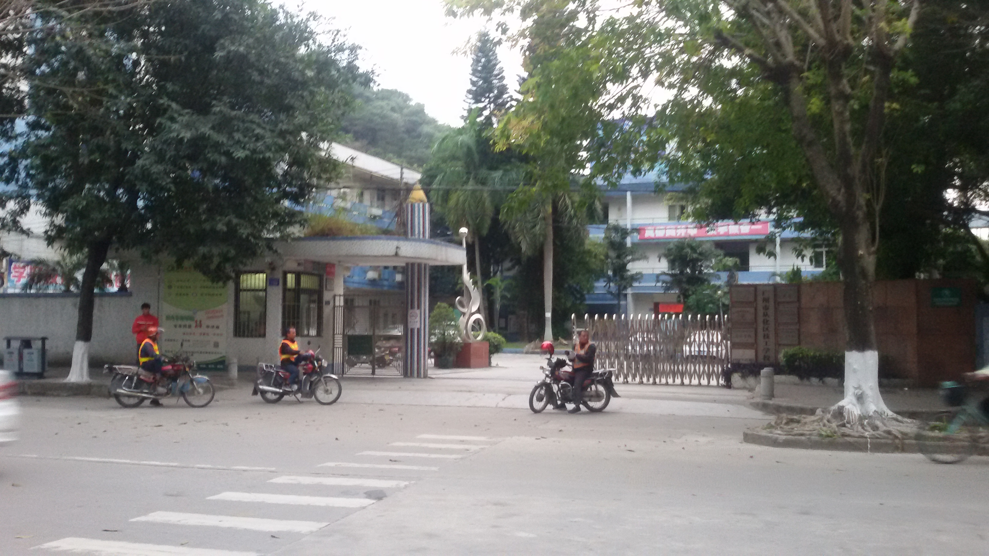 粵語: 從化區技工學校